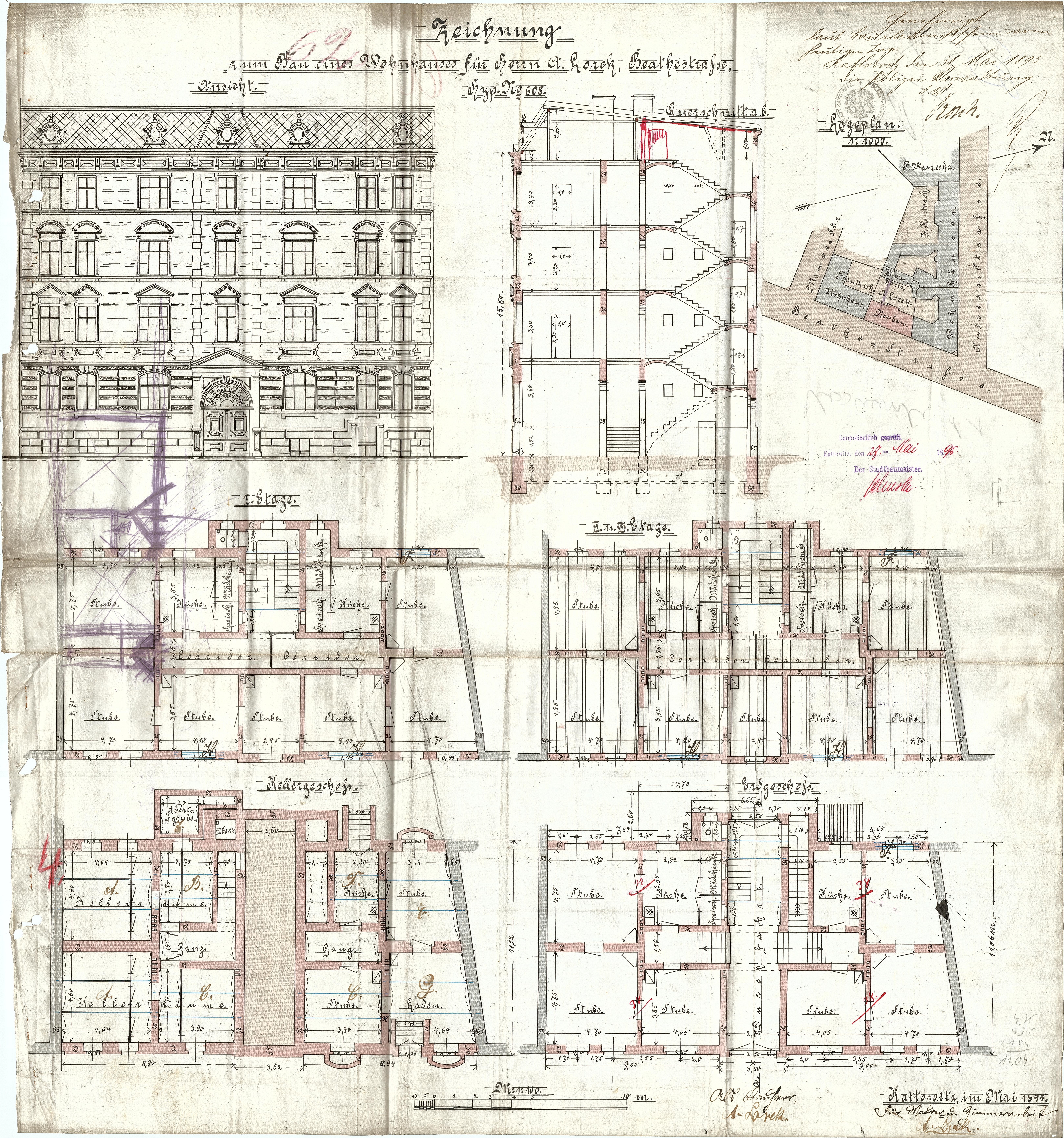 Projekt kamienicy wykonany przez architekta Augusta Lorka w 1895 roku